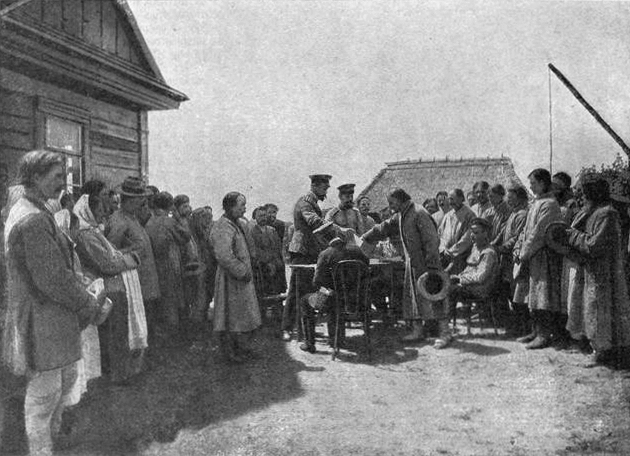 Распределение вновь образованных хуторов между домохозяевами в дер. Белинок, Брашевичской волости, Кобринского уезда, Гродненской губернии.